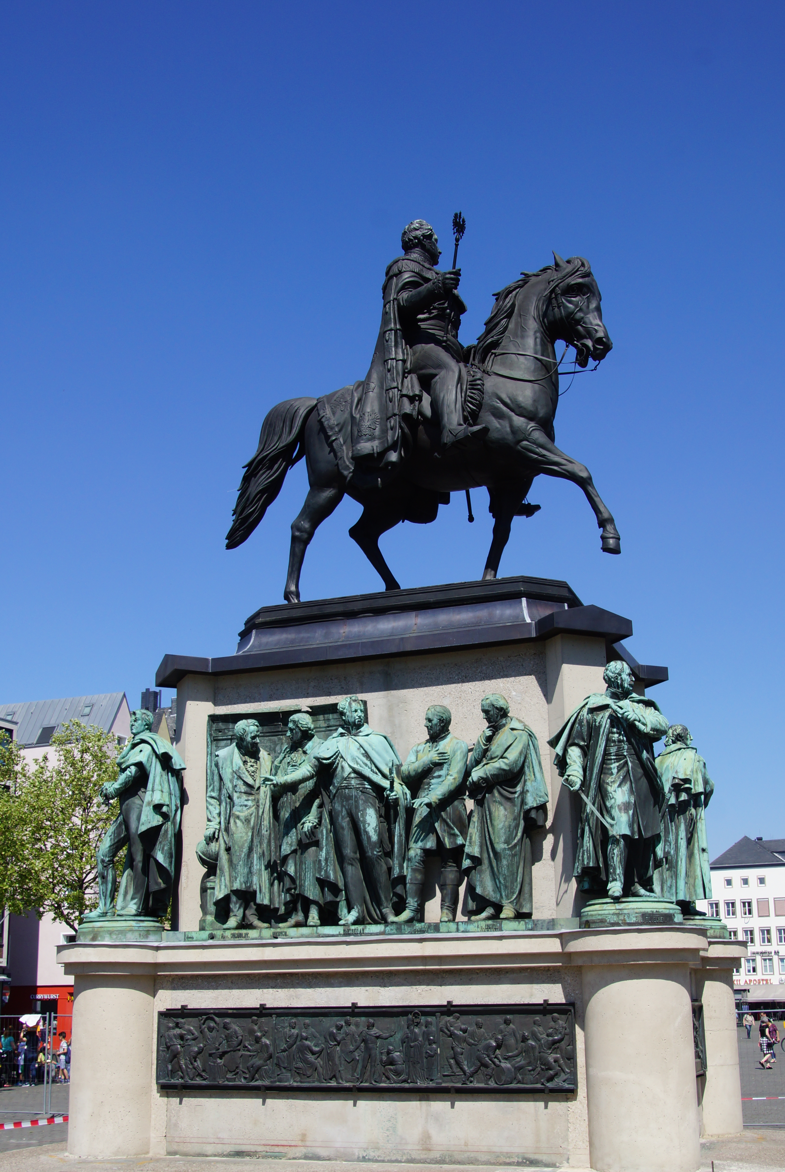 Friedrich Wilhelm III.-Reiterstandbild auf dem Kölner Heumarkt. Gesamtansicht. This is a photograph of an architectural monument.